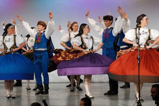 Inauguracja sezonu 2006 w Zespole Pieśni i Tańca Śląsk